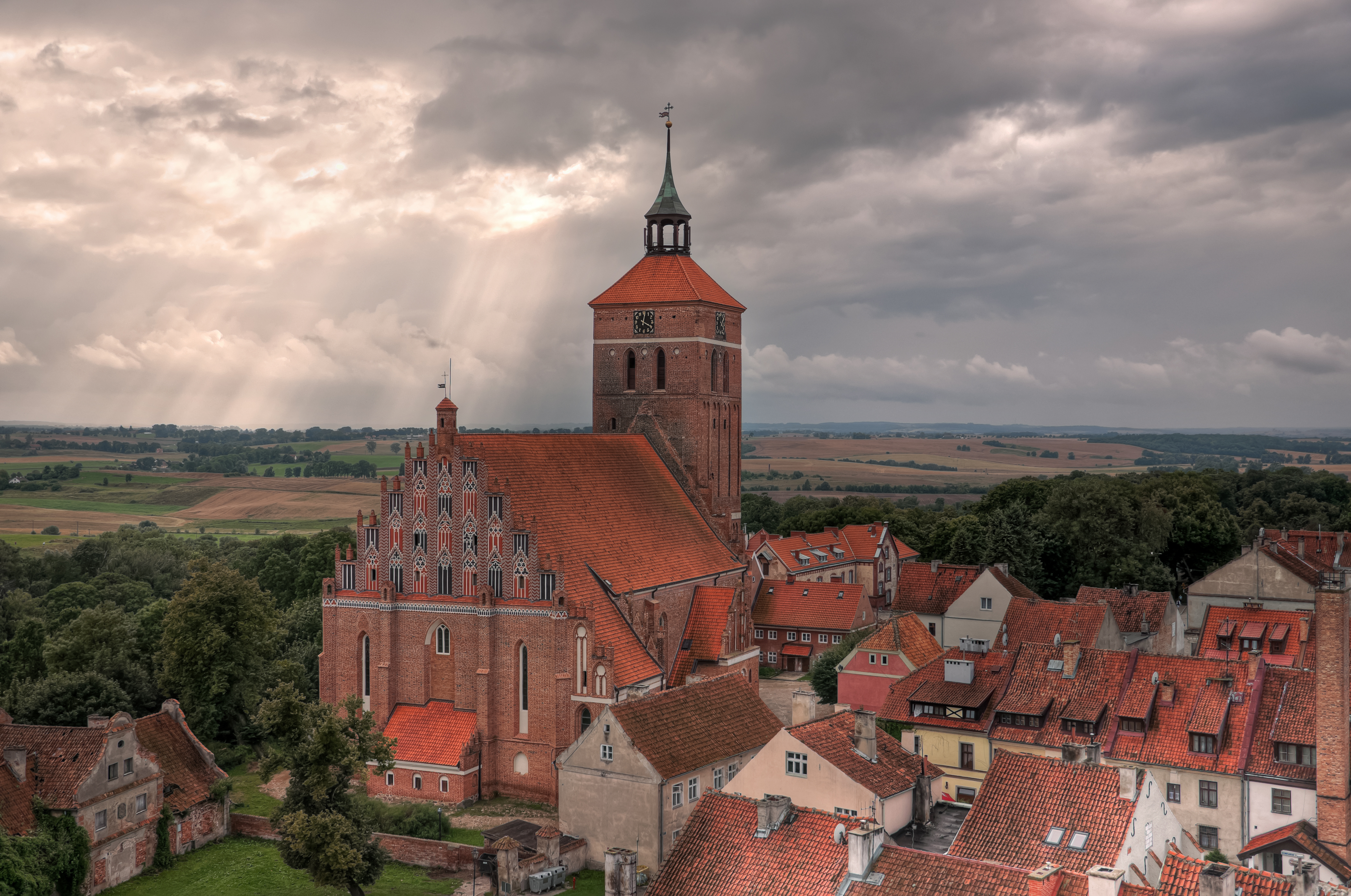 Kościół par. p.w. śś. Apostołów Piotra i Pawła, Reszel